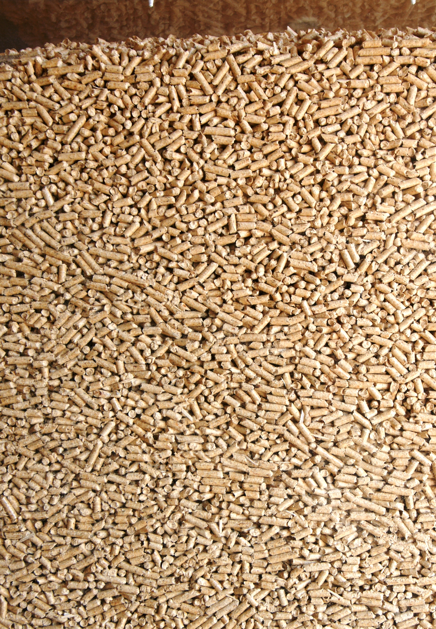 Holzpellets der Firma Binderholz in Fügen (Zillertal).